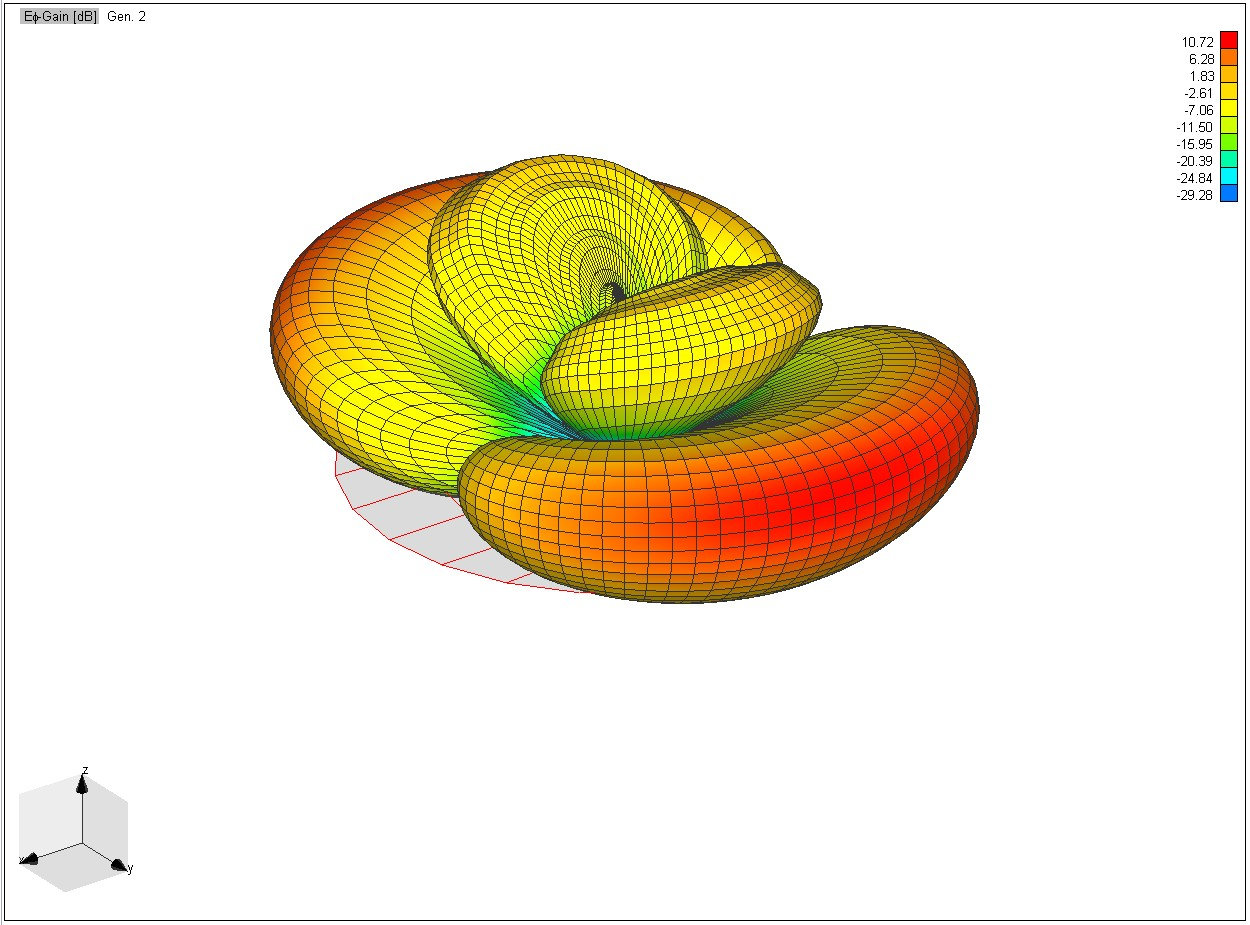 Dual Band Blade Antenna, slot at L1 3D pattern in dBi horizontal polarization